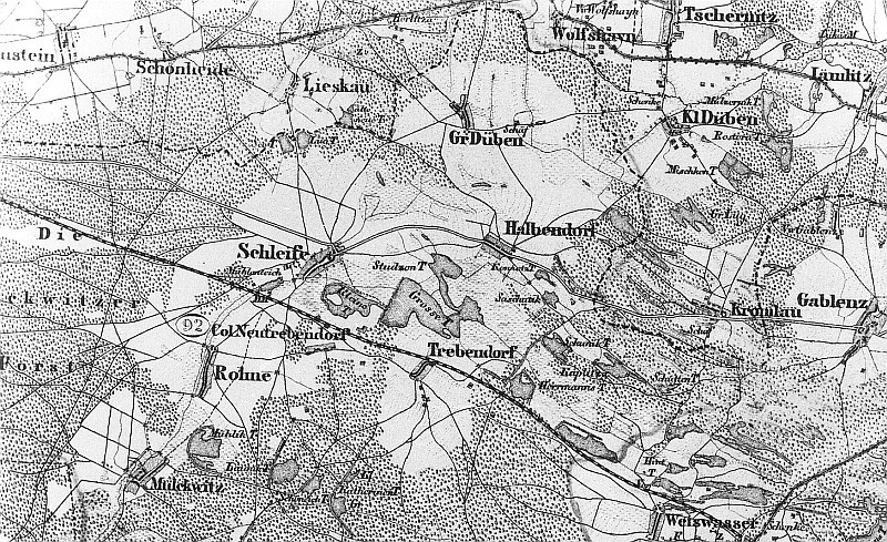 Original image description from the Deutsche Fotothek Trebendorf. Topographische Karte vom Preußischen Staate, Bl. 234 Muskau, aufgen. 1846, Nachträge 1867